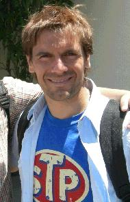 Jose Luis Villanueva, Universidad Catolica